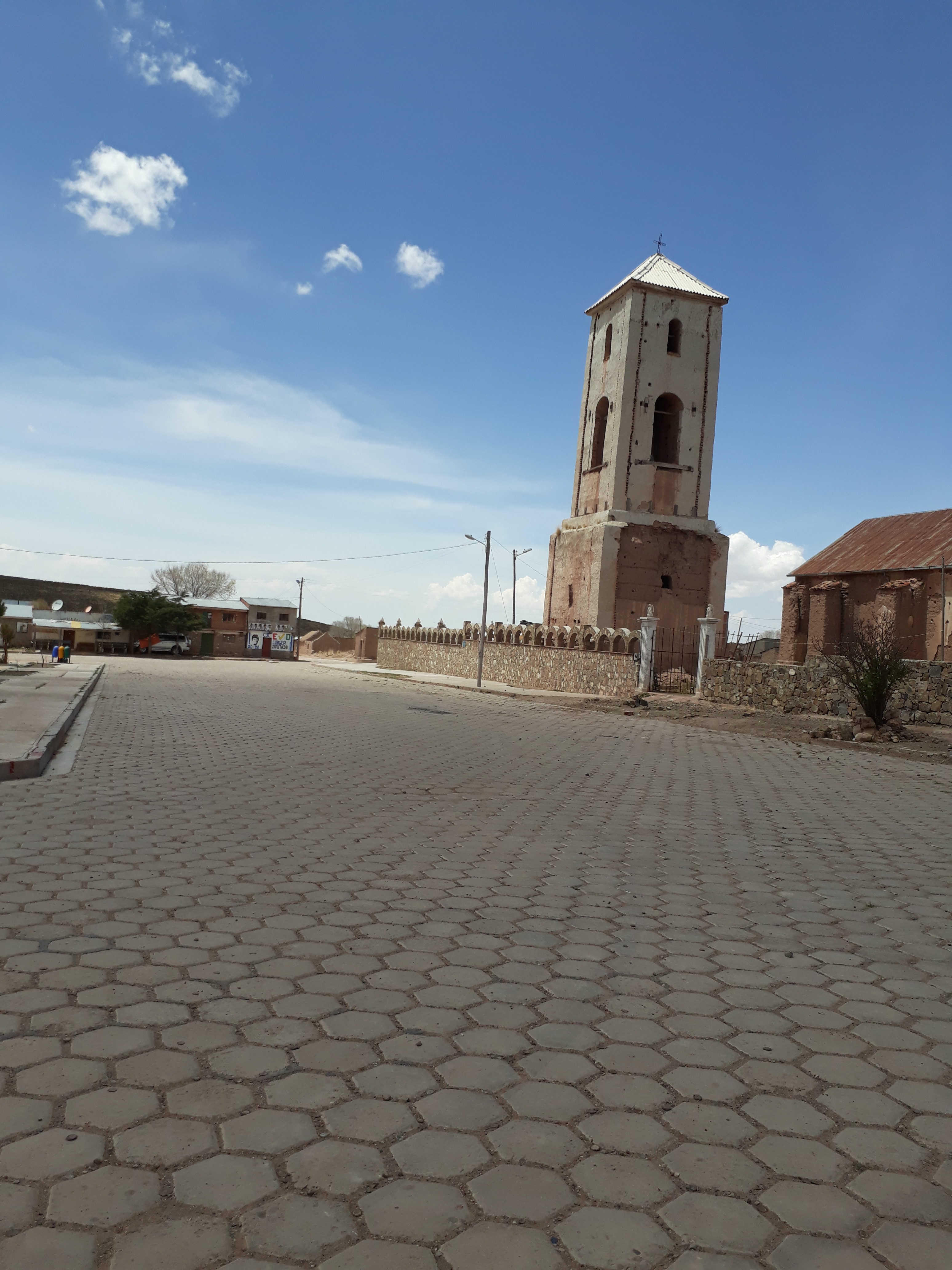 Capital de provincia sud carangas ubicado en en el departamento de oruro